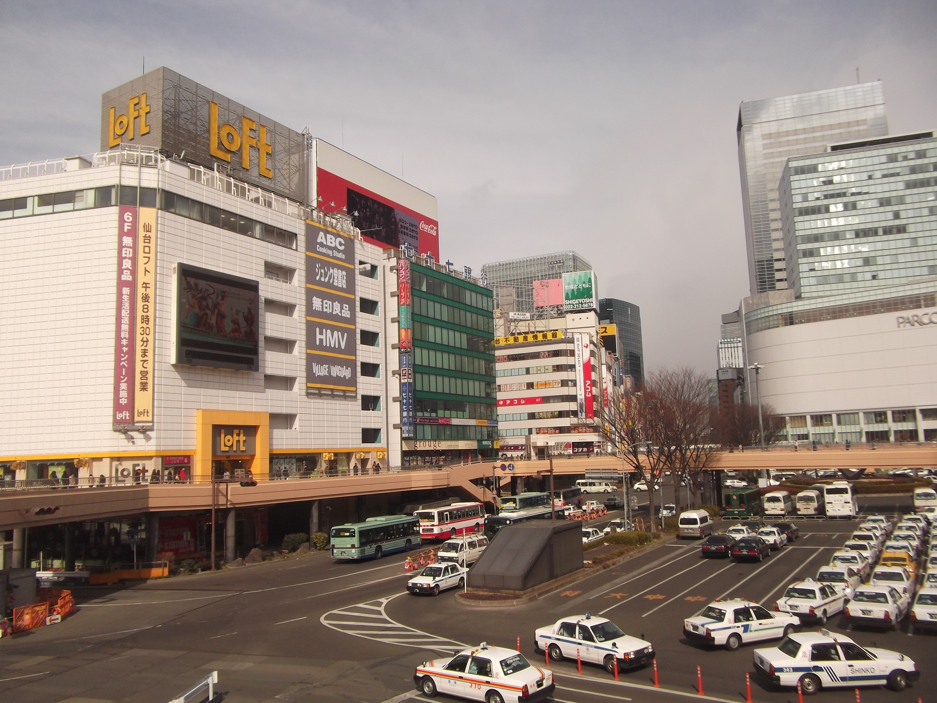 仙台駅西口付近の様子